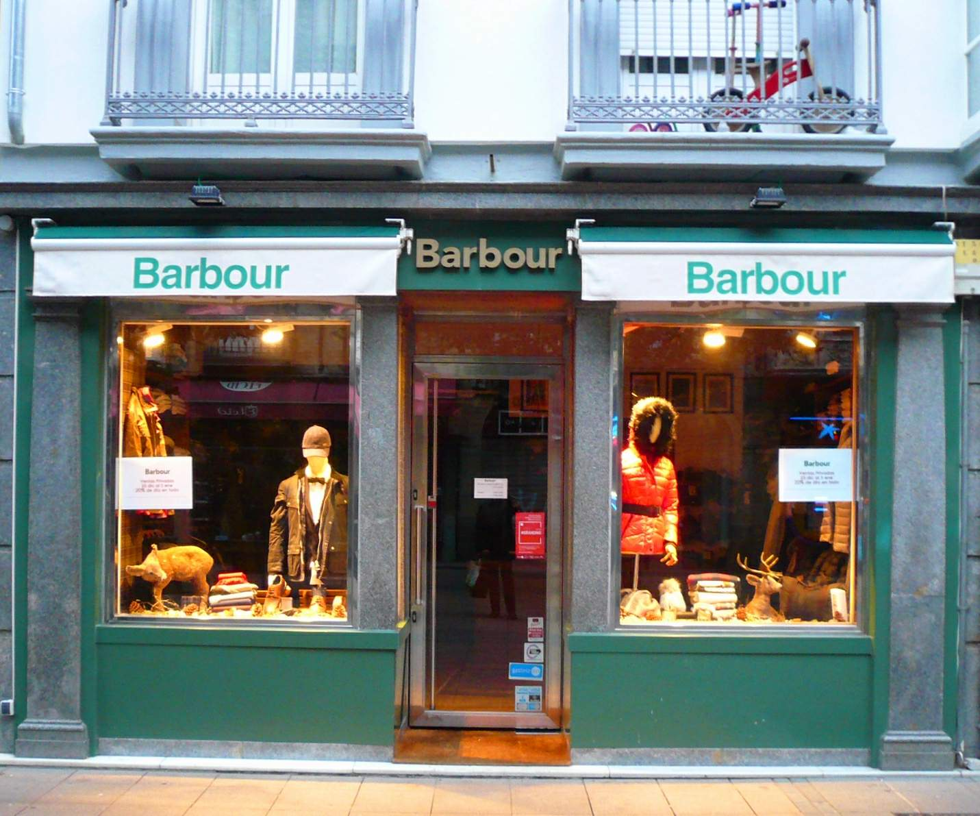 Tienda de Barbour en la Calle Dato de Vitoria